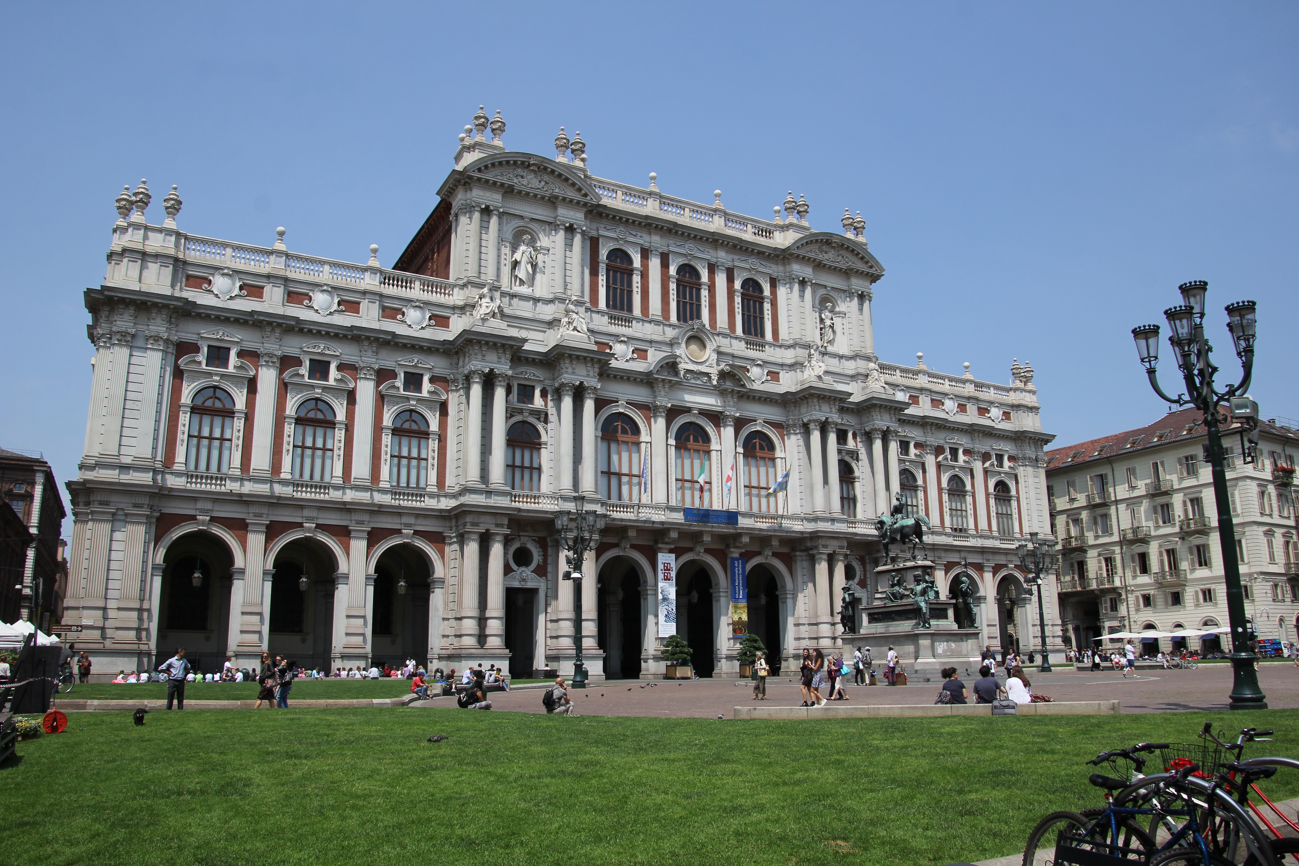 Torino, museo del Risorgimento italiano